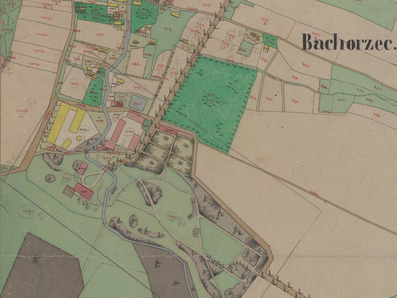 Manor house in Bachórzec on a map from 1851